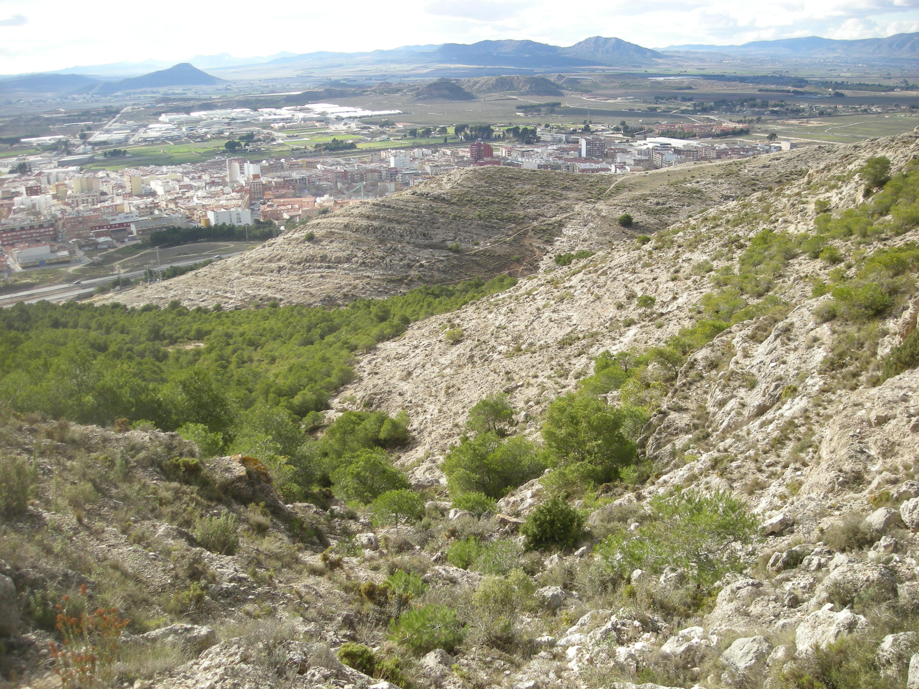 Rambla del Conejo, en la Sierra de la Villa (sendero PR-CV 312). En primer plano la rambla, detrás la mitad norte de Villena y el polígono industrial El Rubial, más allá El Polovar y los Cabezos y al fondo la sierra Alhácera (o Lácera) y el altiplano murciano.